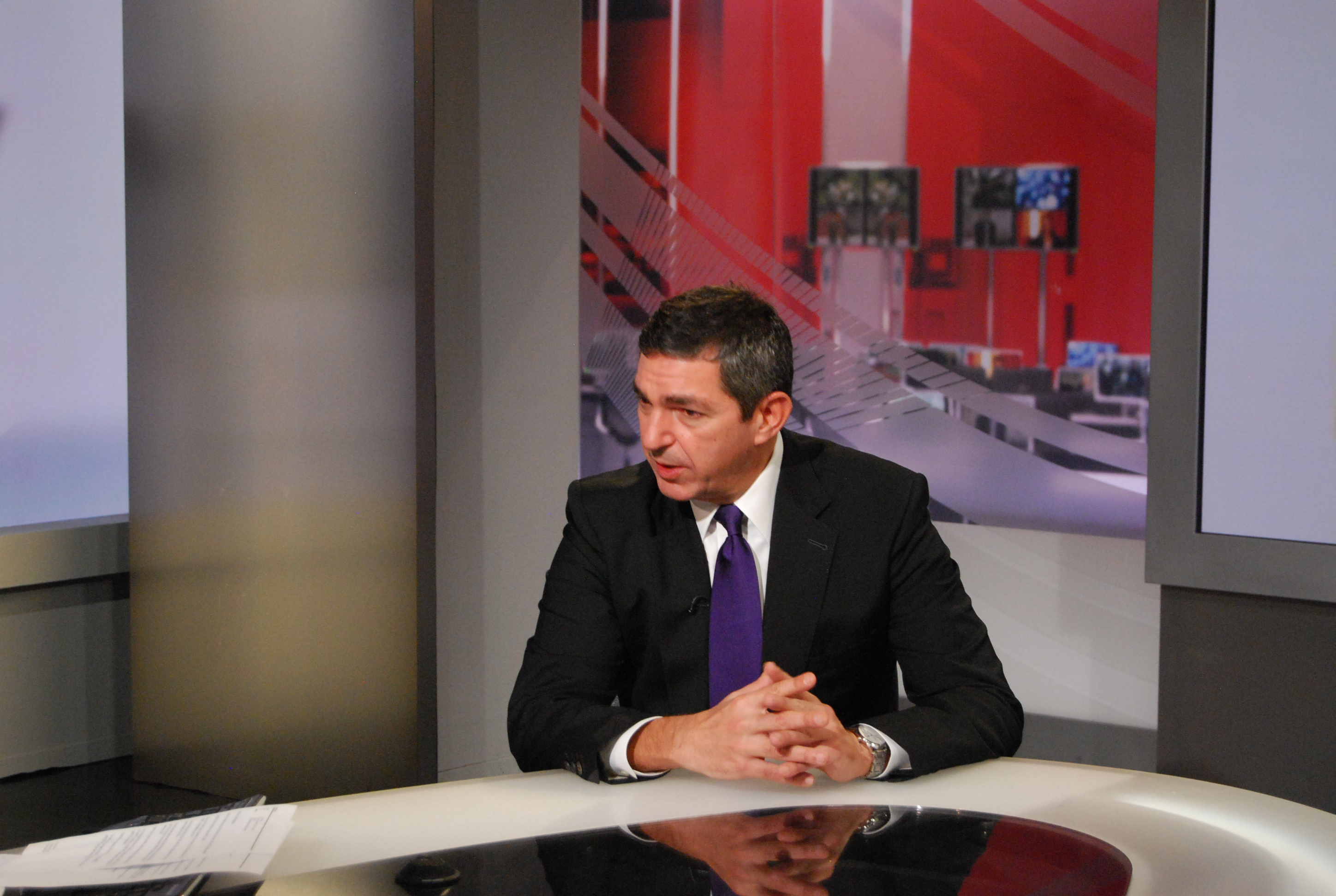 Συνέντευξη Υπουργού Εξωτερικών Σταύρου Λαμπρινίδη σε BBC News (27.10.11) Foreign Minster's Stavros Lambrinidis interview on BBC News(27.10.11)